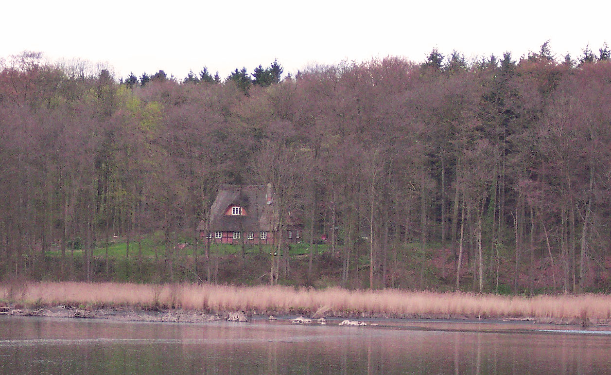 Hamlet Daudieck between Bliedersdorf and Horneburg - Gut Daudieck auf halber Strecke zwischen Bliedersdorf und Horneburg